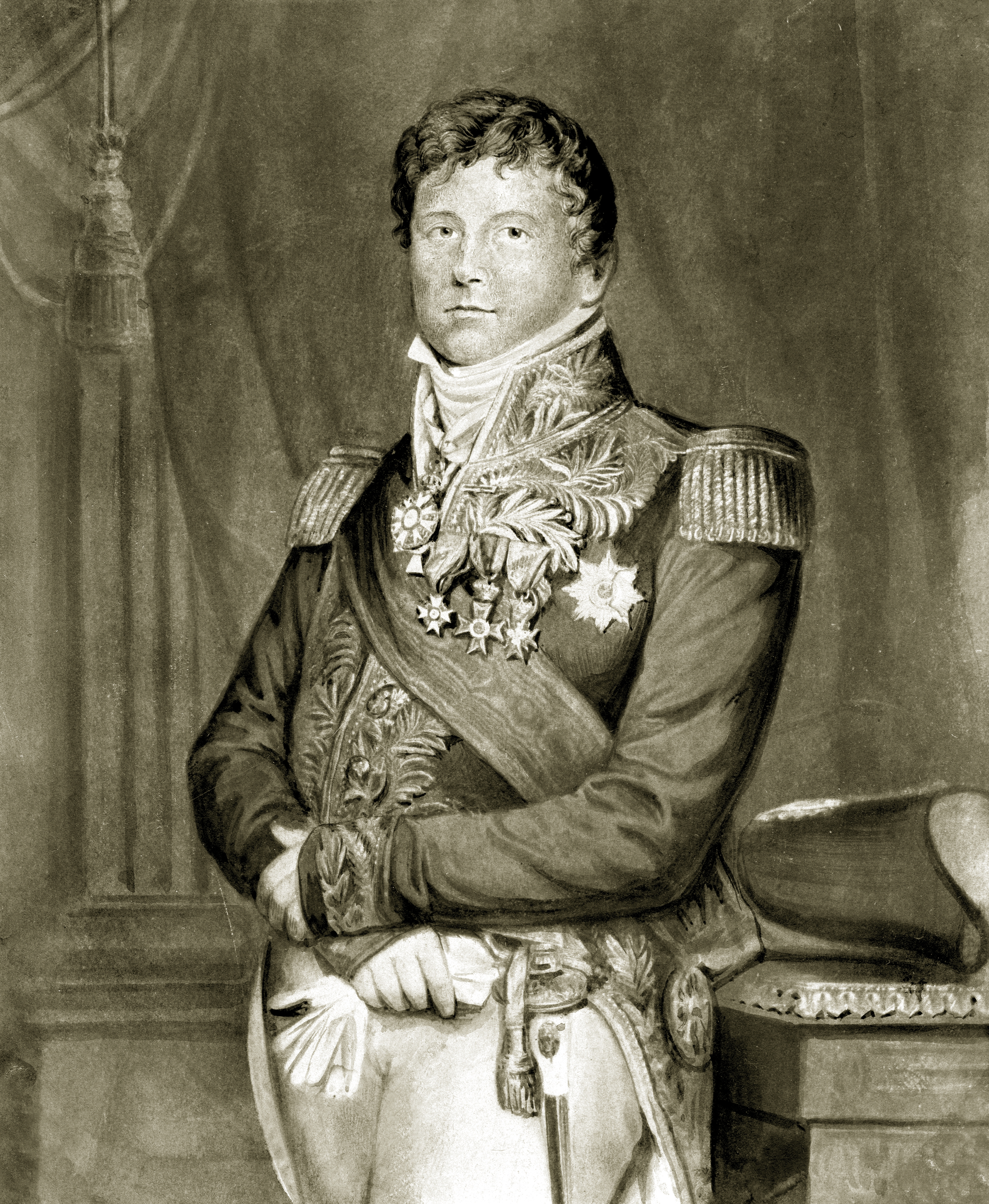 Ludwig von Wirschinger, Statistiker in Bayern